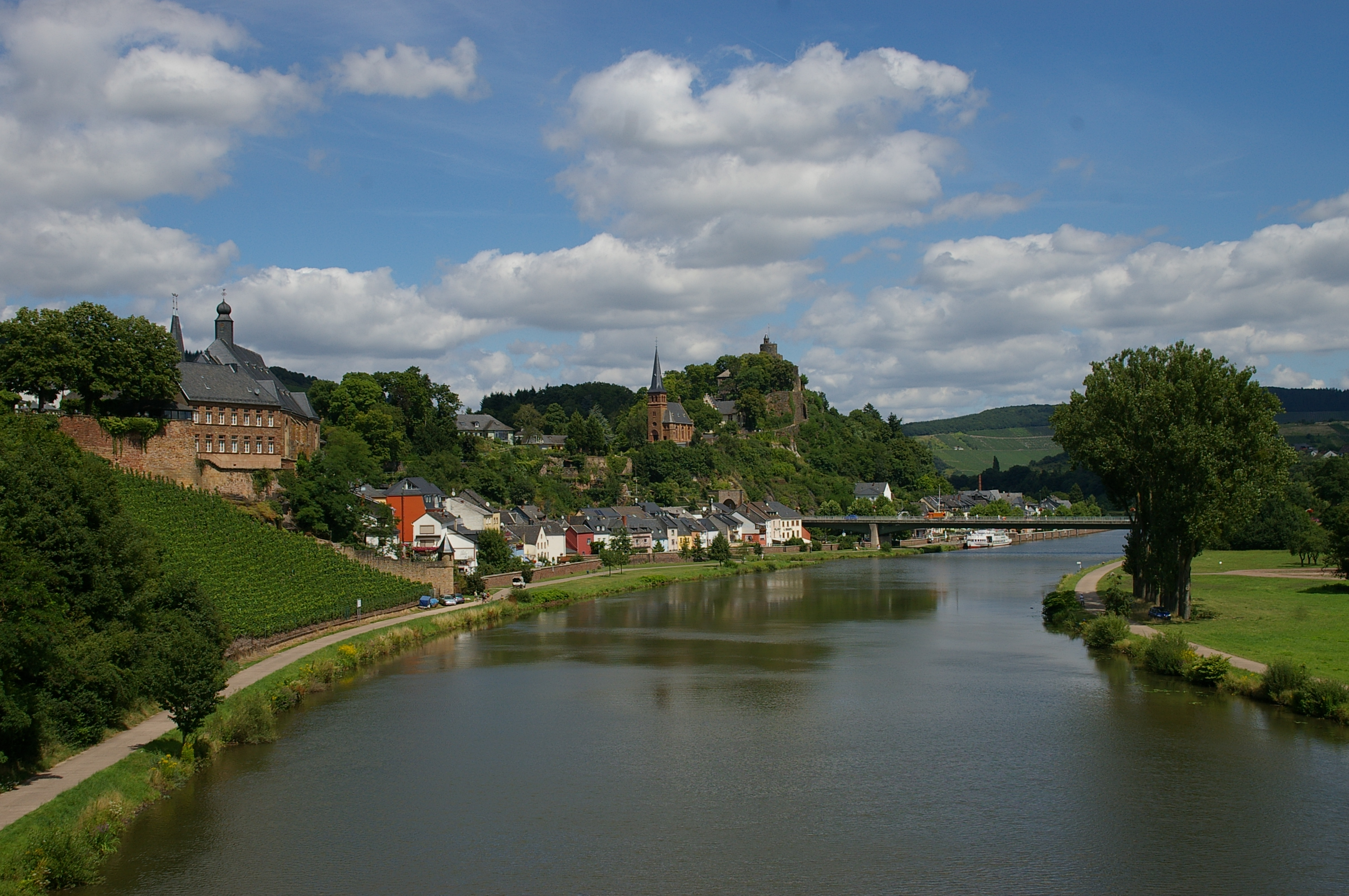 Saar bei Saarburg